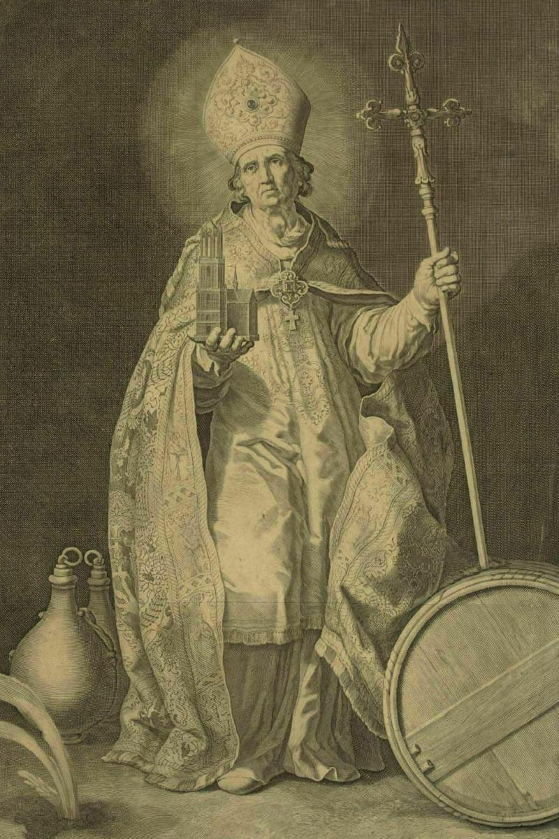 Der Heilige Willibrord